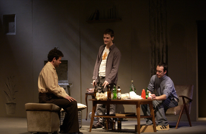 Nebojša Glogovac, Damjan Kecojević i Goran Šušlik u predstavi Hadersfild